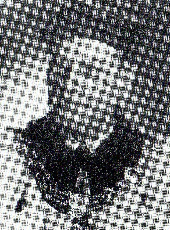 Alfons Klafkowski (prawnik), profesor UAM.